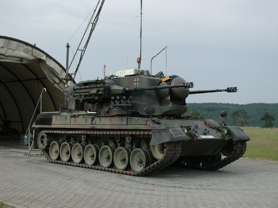 Prototyp eines Flakpz Gepard mit Amerik. Stinger, ging nie in Serie.